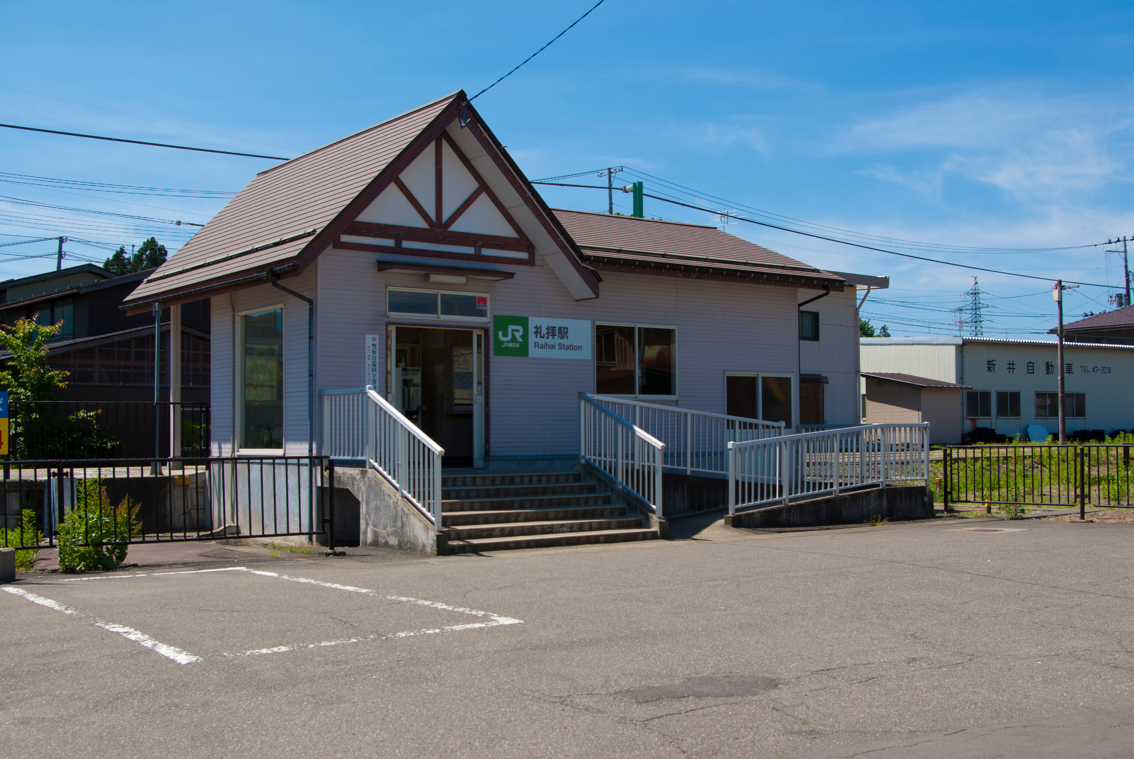 東日本旅客鉄道株式会社越後線礼拝駅